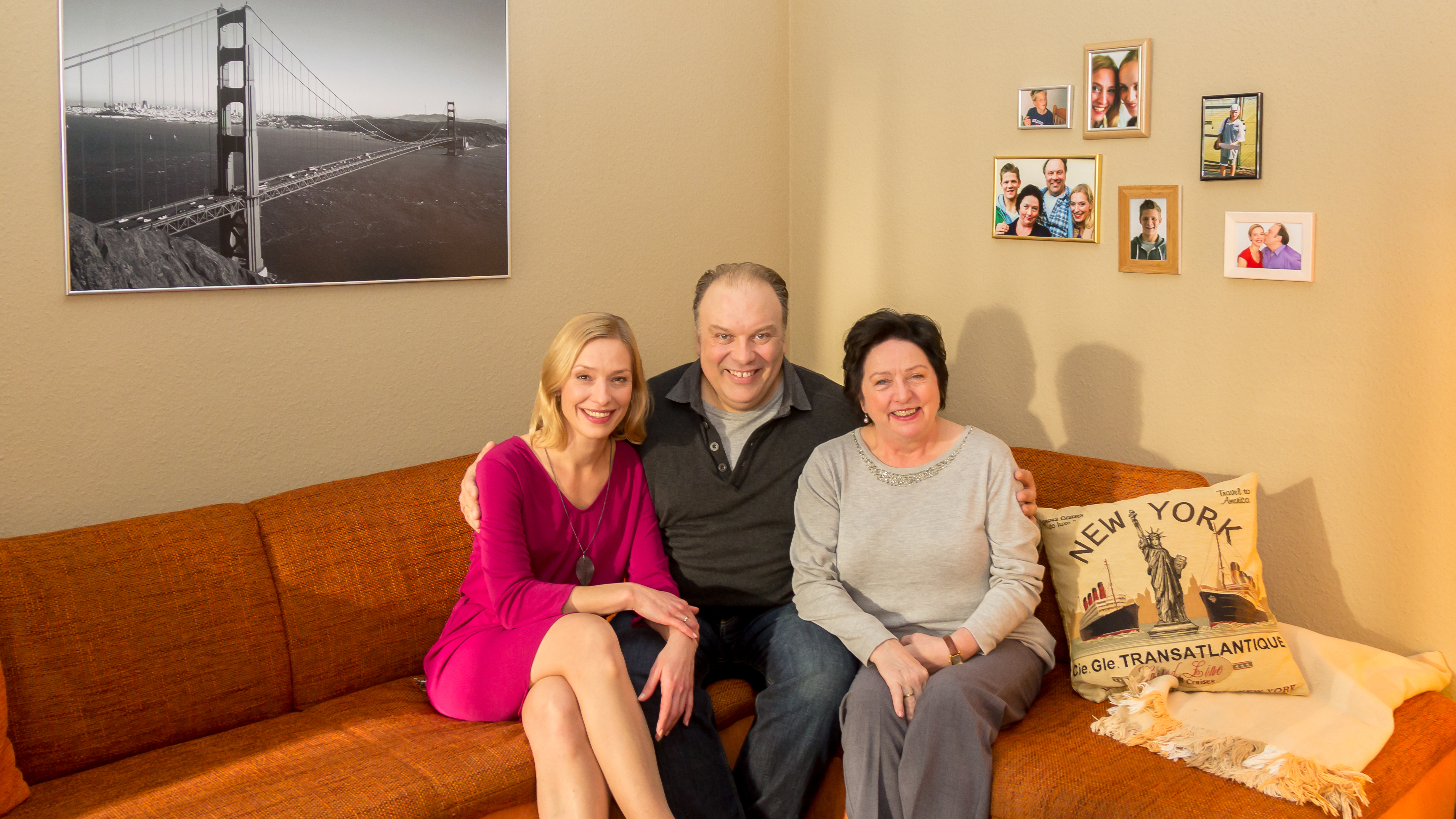 Set-Termin für die Presse zu den Dreharbeiten der 3. Staffel „Die LottoKönige“. Gedreht wurde in einem Mehrfamilienhaus in Köln-Stammheim. Foto: Waldemar Kobus als Lottogewinner „Rudi König“, Sandra Borgmann als seine Frau „Claudia König“ und Beate Abraham als „Oma Helga“